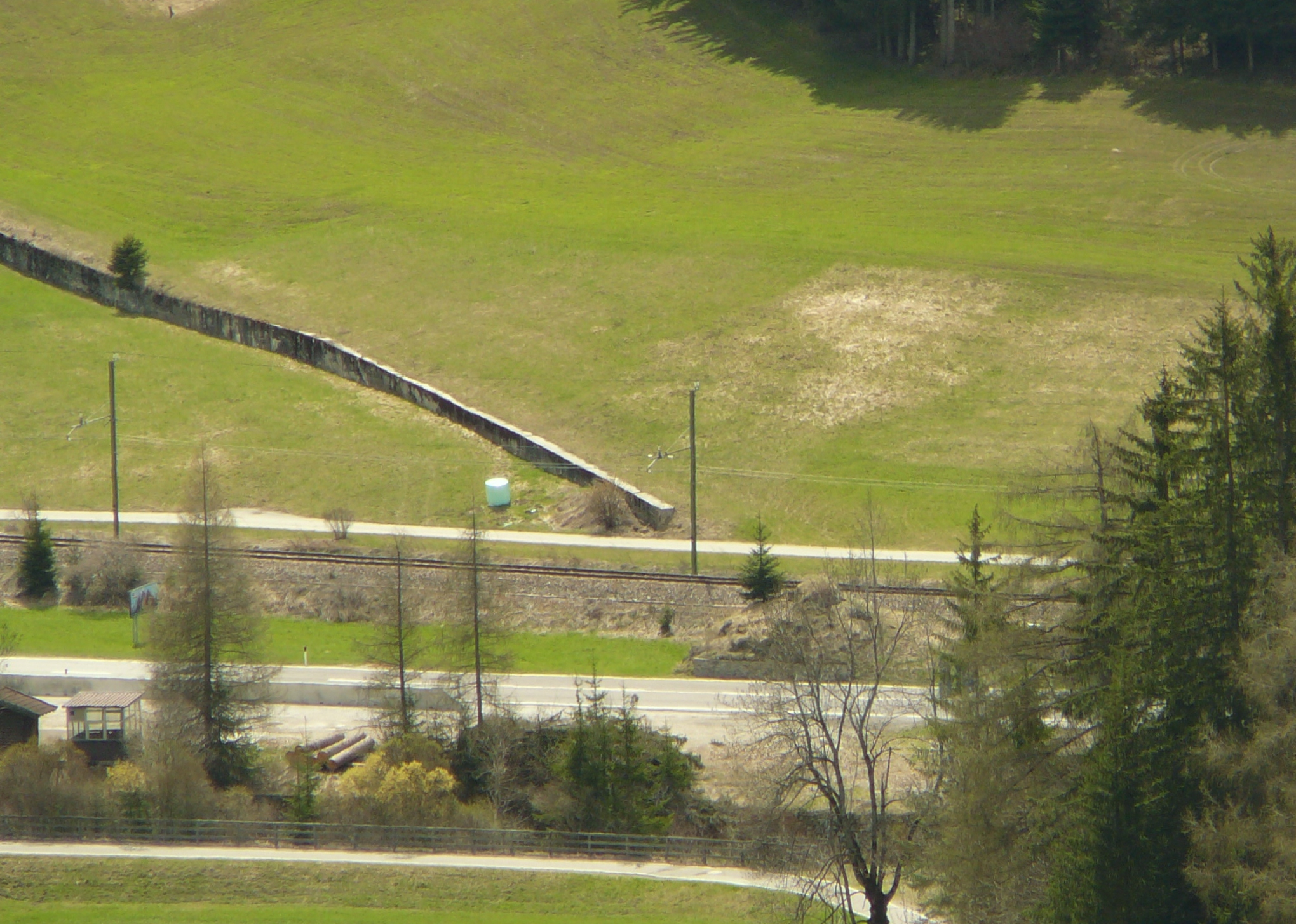 L'opera 1, sbarr. drava